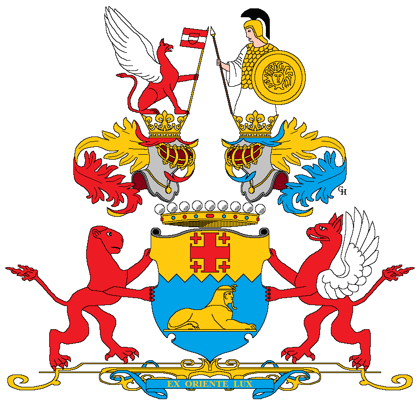 Wappen des österreichisch-ungarischen Feldzeugmeisters und k.k. Geheimen Rates Anton Freiherrn Prokesch von Osten (1795–1876), verliehen anlässlich seiner Erhebung in den österreichischen Grafenstand 1871. Zeichnung von Gerd Hruška ( Für weitere Informationen zu dieser Standeserhebung siehe (